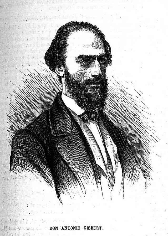 Retrato de Antonio Gisbert, en la revista española El Museo Universal.